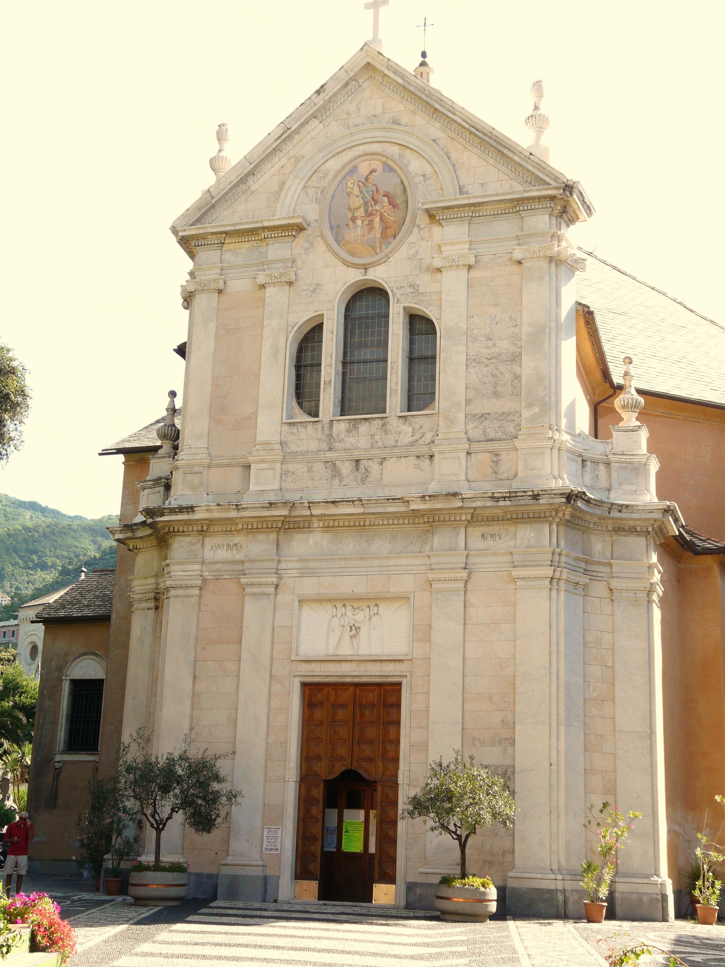 Chiesa di San Martino, Zoagli, Liguria, Italia